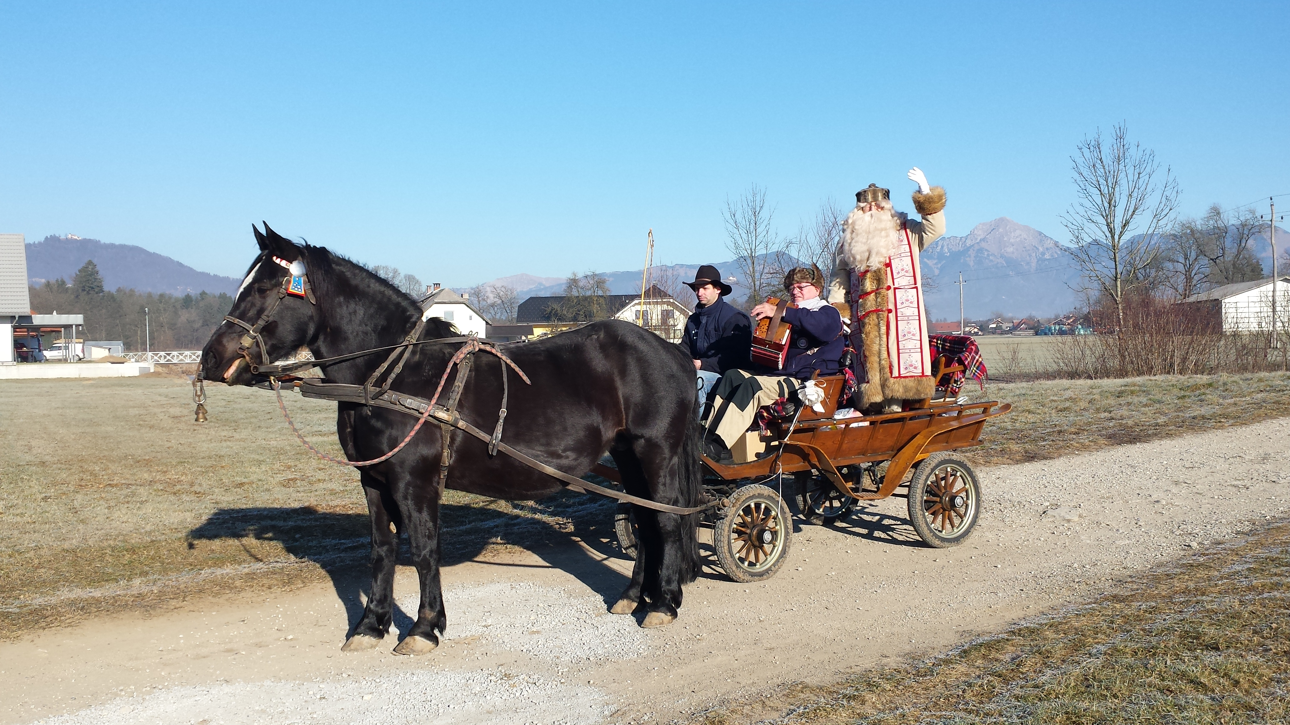 Dedek Mraz vsako leto v naselju Šutna, Žabnica obišče otroke. S kočijo ga pripelje kočijaž Sluga iz Žabnice. S sabo ima darila za otroke. Spremlja ga harmonikar. Lokacija: Šutna, Žabnica, Slovenija december 2016 (Dedek: Matjaž Eržen, Žabnica Kočijaž - Fijaker: Metod Hafnar (Slugov iz Žabnice) Harmonikar: Rudi Jereb (Sveti Duh - Smoletov Ruda ))